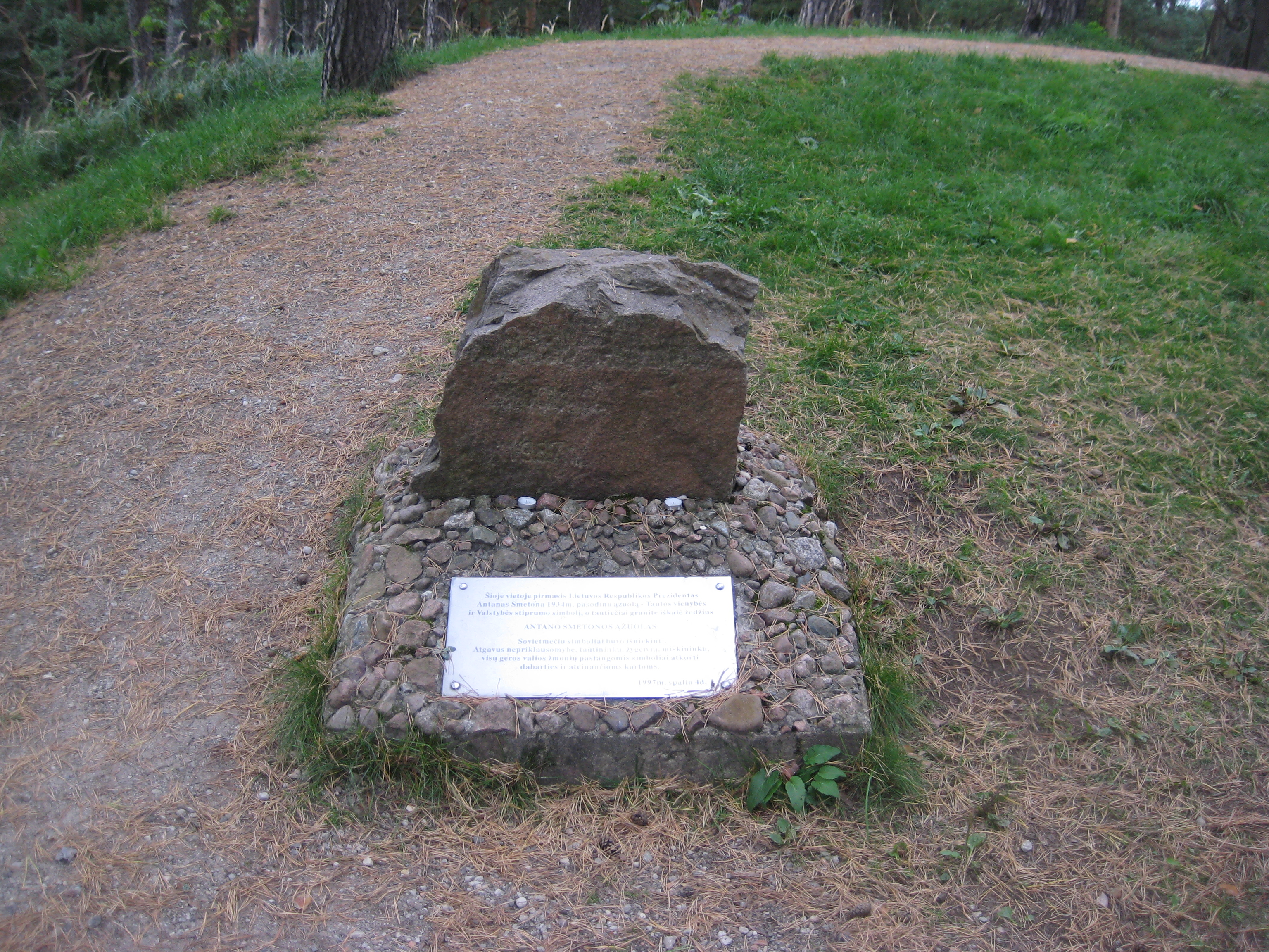 Linkmenų sen., Lithuania